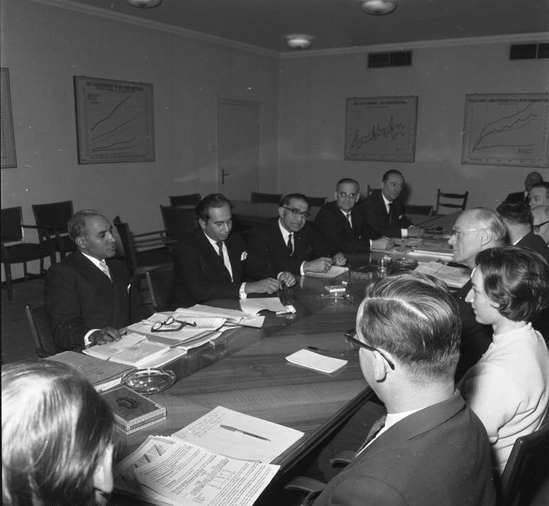 Der pakistanische Minister für Energie und Entwicklungsplanung Bhutto bei Staatssekretär Westrick